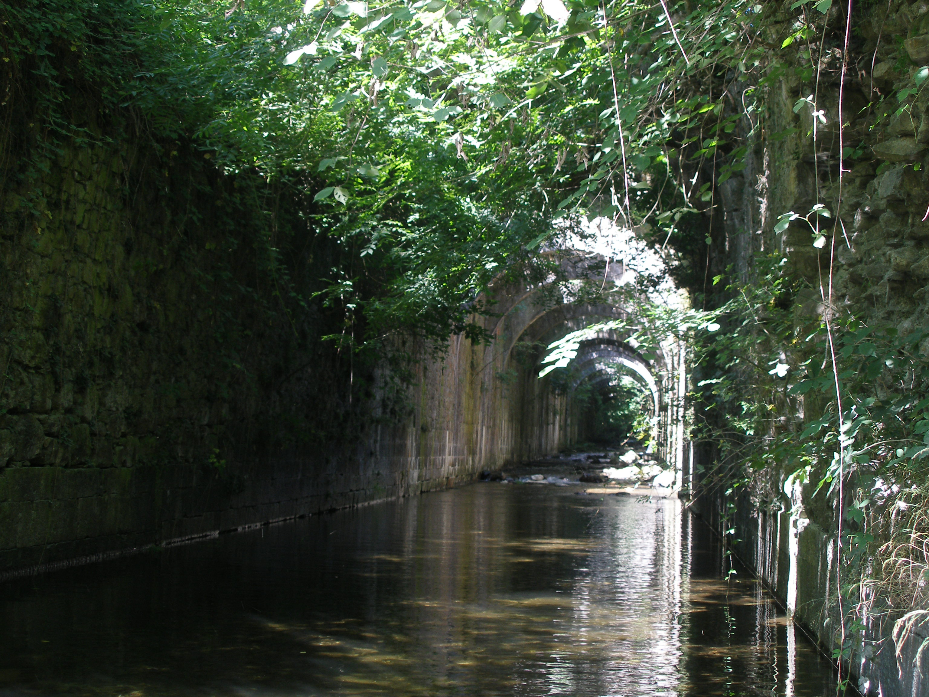 Orbaitzeta